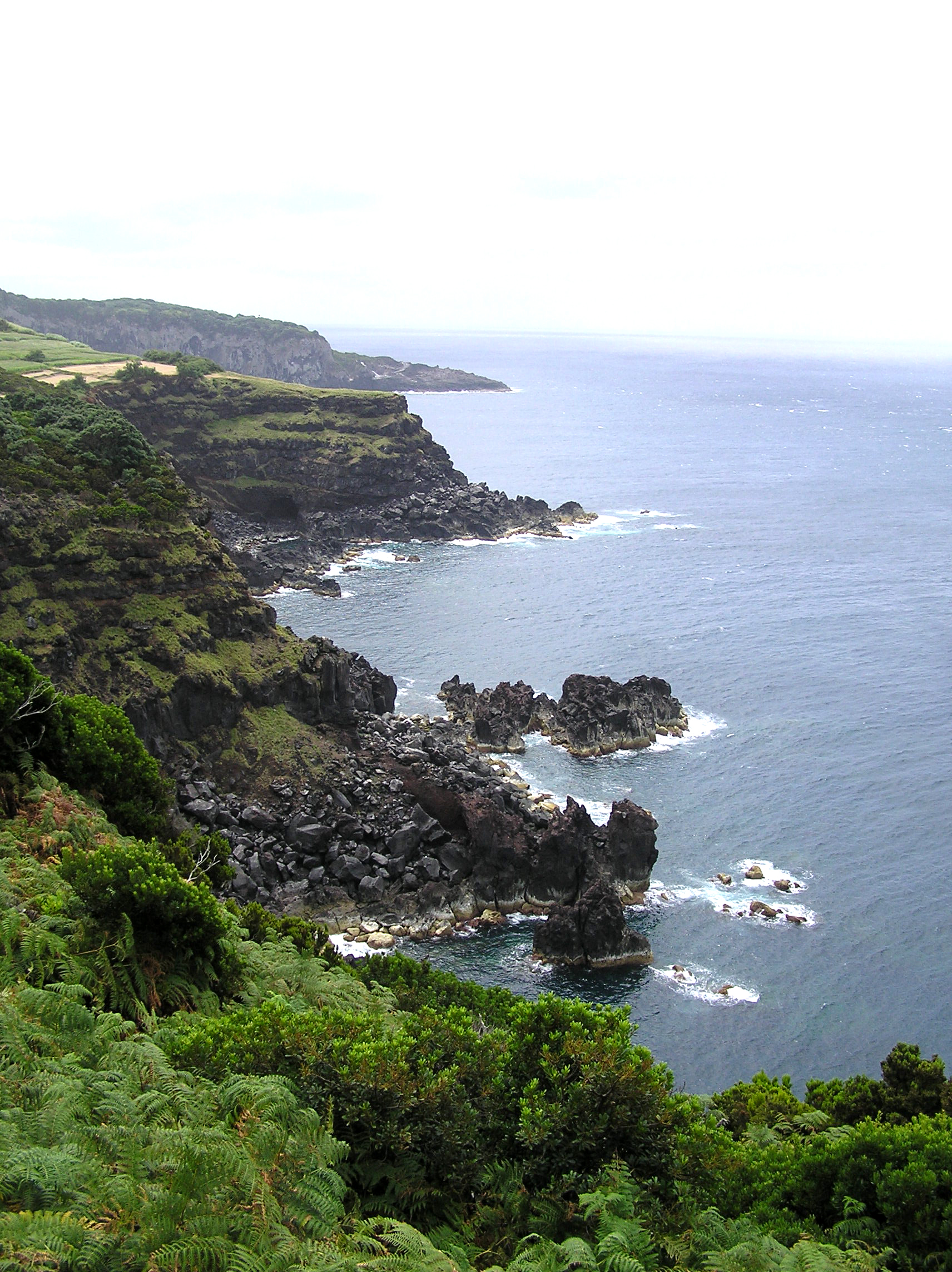 Zona de Paisagem protegidas da Serra de Santa Bárbara e Pico Alto, costa da Ponta da Serreta, ilha Terceira, Açores